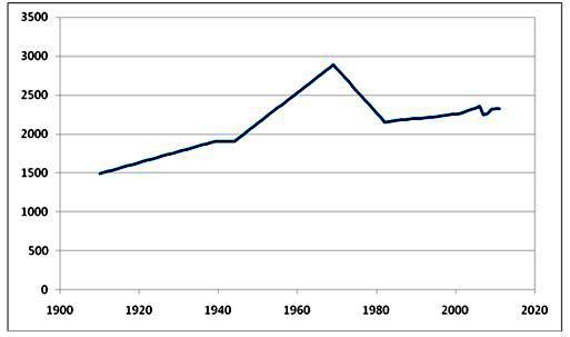 Csongor népességszámának változása